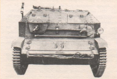 Mały czołg rozpoznawczy TK, model seryjny: widok z przodu.